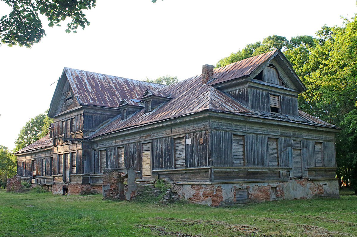 Грушаўка. Сядзіба Рэйтанаў